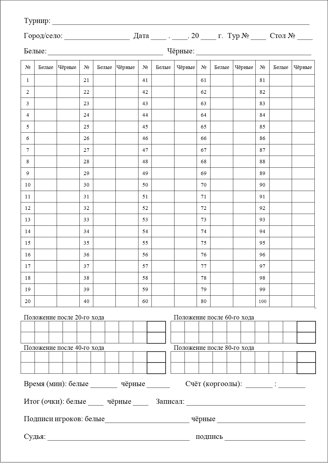 Бланк записи партии в тогуз коргоол